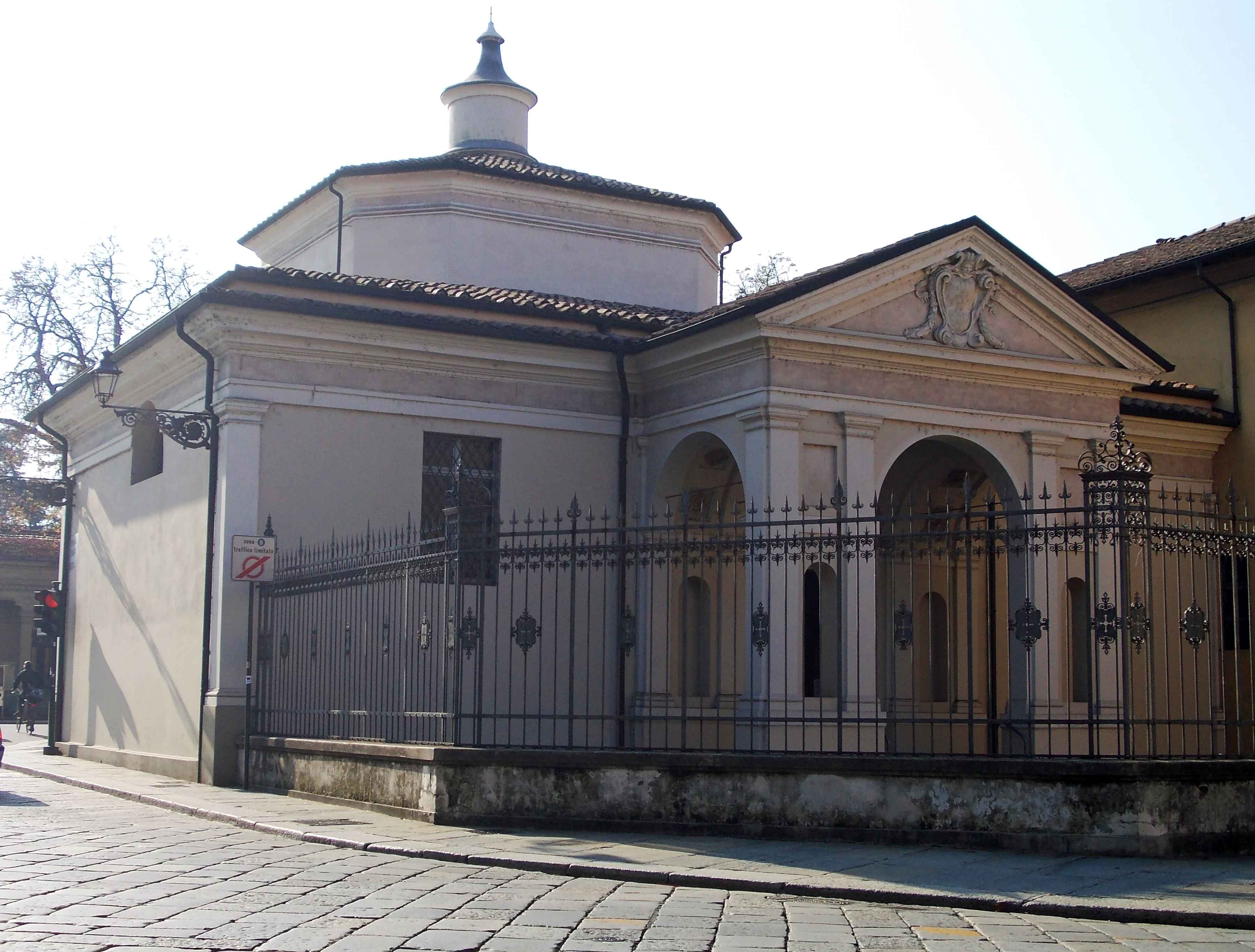 La chiesa di Santa Maria degli Angeli (o dell'Addolorata, o del Bambin Gesù), delle clarisse cappuccine di Parma